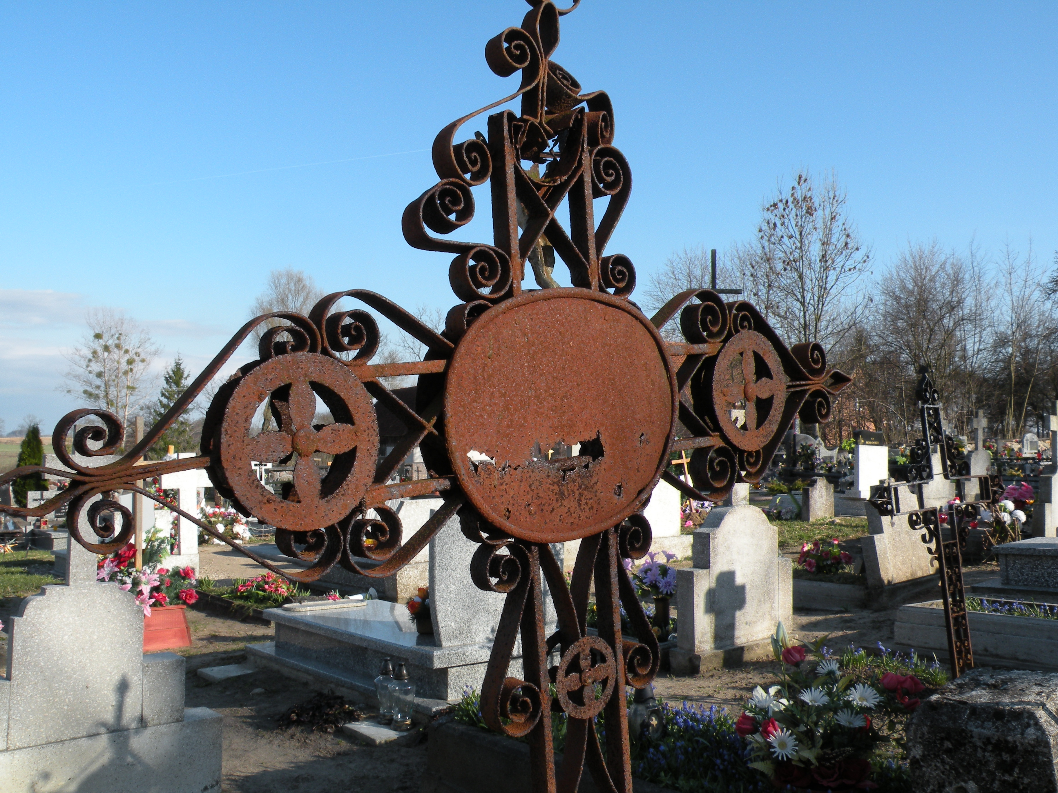 Leginy - cmentarz przykościelny (zabytek nr A-615 i 633 z 10.10.1967)